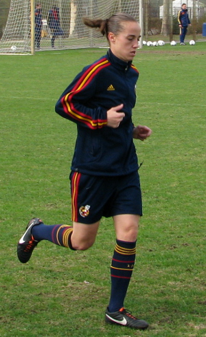 Leire Landa Iroz, spanische Nationalspielerin